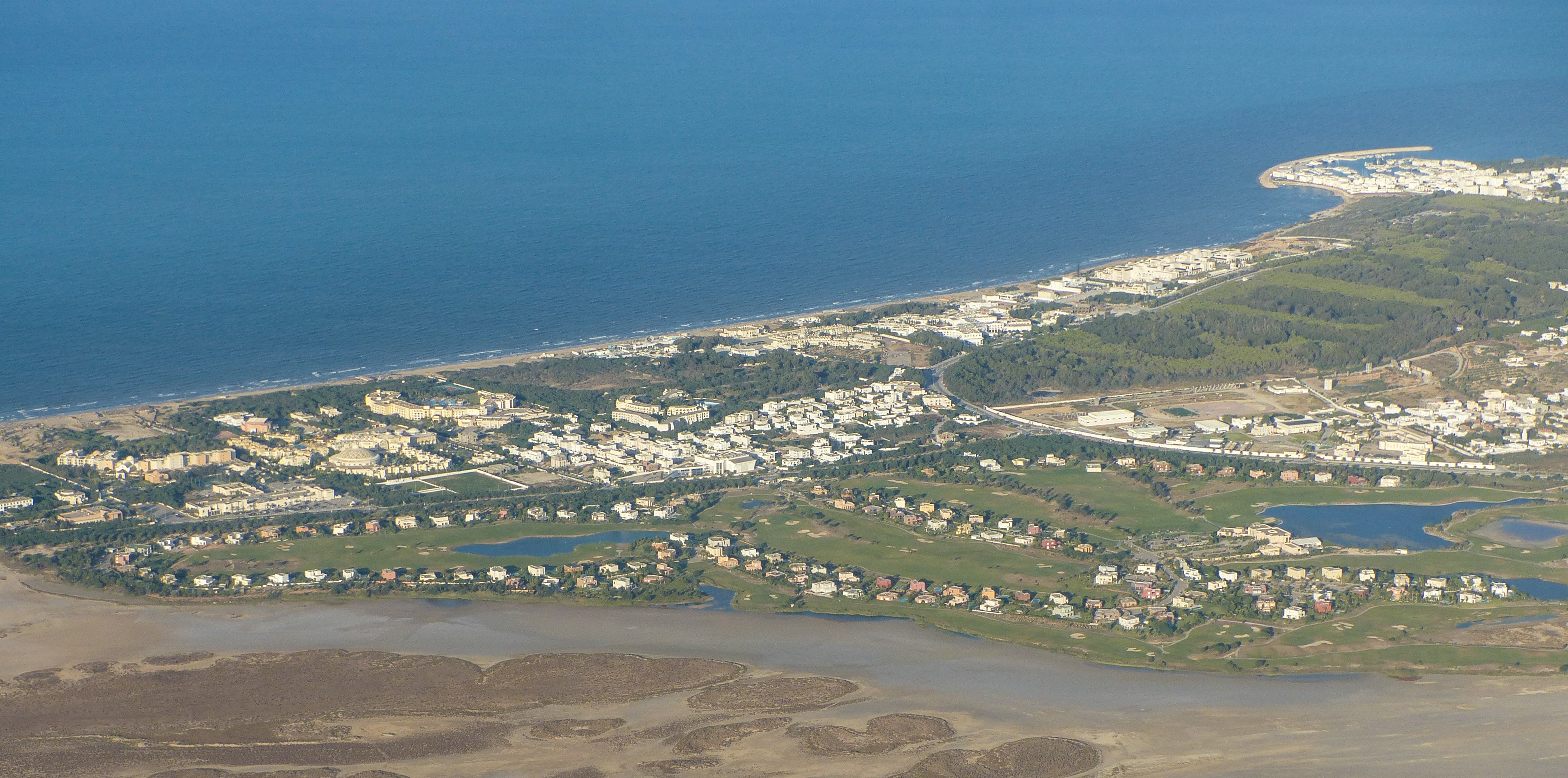 Nouvelle zone touristique de Gammarth